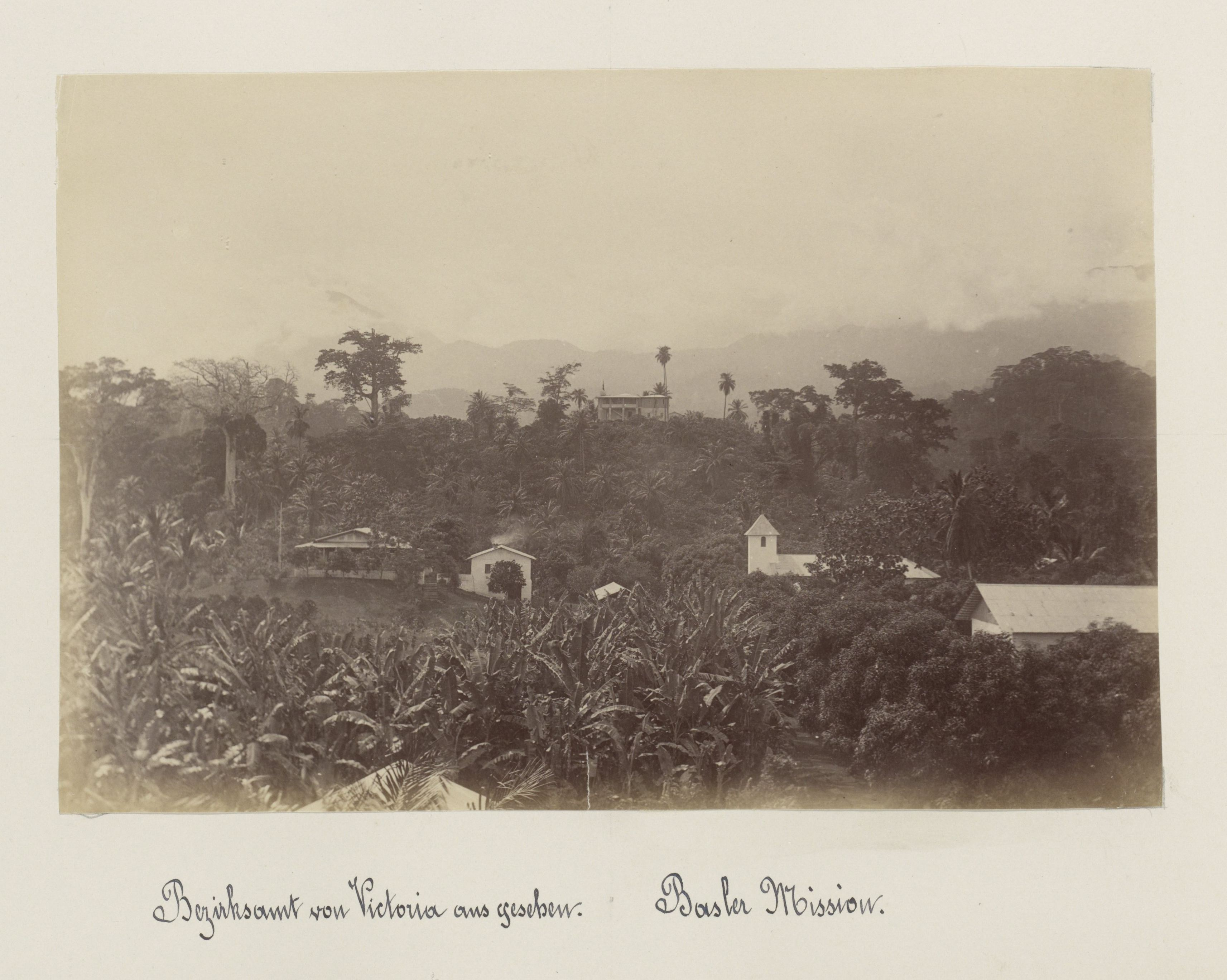 IdentificatieTitel(s): Exterieur van een districtsgebouw gezien vanuit Victoria (Kameroen) met rechts een kerk van de Basler MissionObjecttype: foto Objectnummer: RP-F-F01175-YOmschrijving: Onderdeel van Fotoalbum met opnames van Kameroen rond 1899.VervaardigingVervaardiger: fotograaf: anoniemPlaats vervaardiging: KameroenDatering: 1899Fysieke kenmerken: albuminedrukMateriaal: fotopapier Techniek: albuminedrukAfmetingen: h 131 mm × b 196 mmToelichtingIn het voetspoor van de Duitse kolonisten kwam de Basler Mission (Missie van Bazel) naar Kameroen, Waar: zij zendingswerkzaamheden verrichtte.OnderwerpWat: prospect of village, silhouette of villagechurch (exterior)WaarVictoriaVerwerving en rechtenVerwerving: overdracht van beheer 1994Copyright: Publiek domein